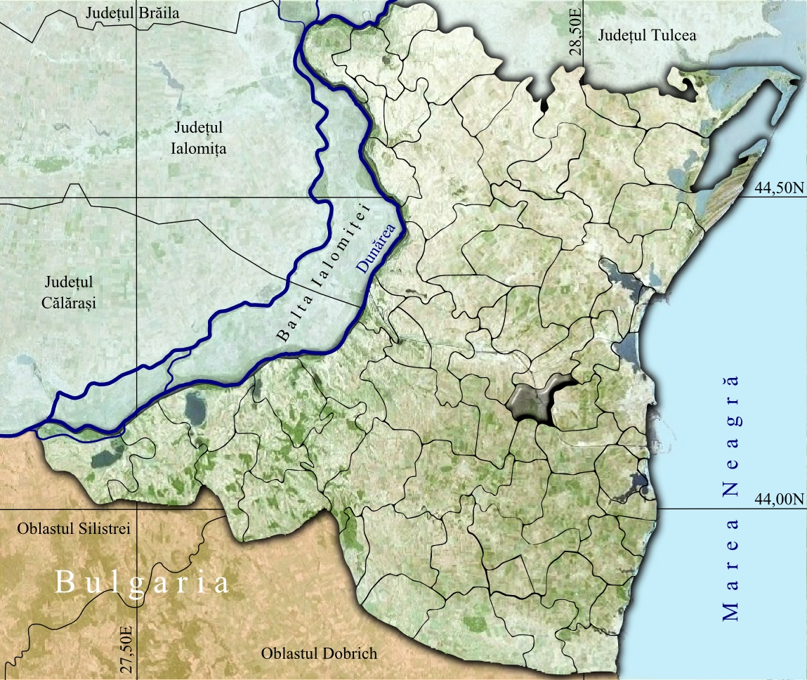 Murfatlar jud Constanta.jpg